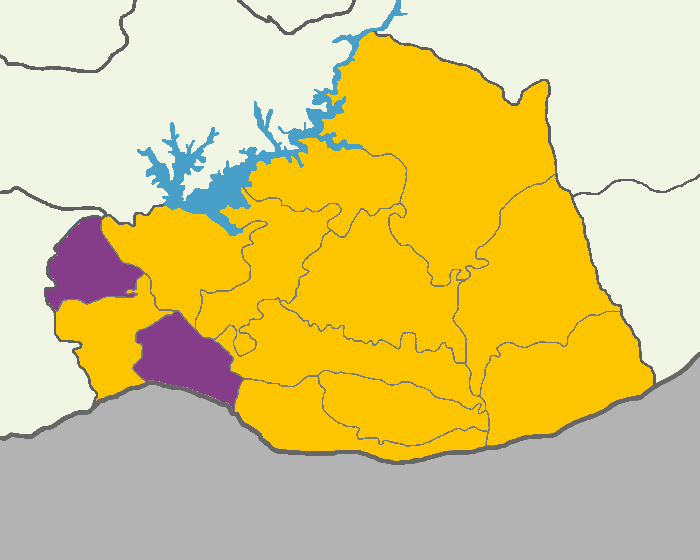 Şanlıurfa'da 2014 Türkiye cumhurbaşkanlığı seçimi